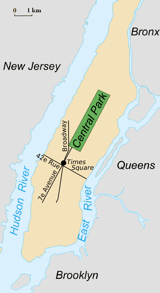 Plan de situation de Times Square